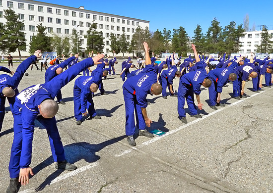 201-я Гатчинская ордена Жукова дважды Краснознаменная военная база